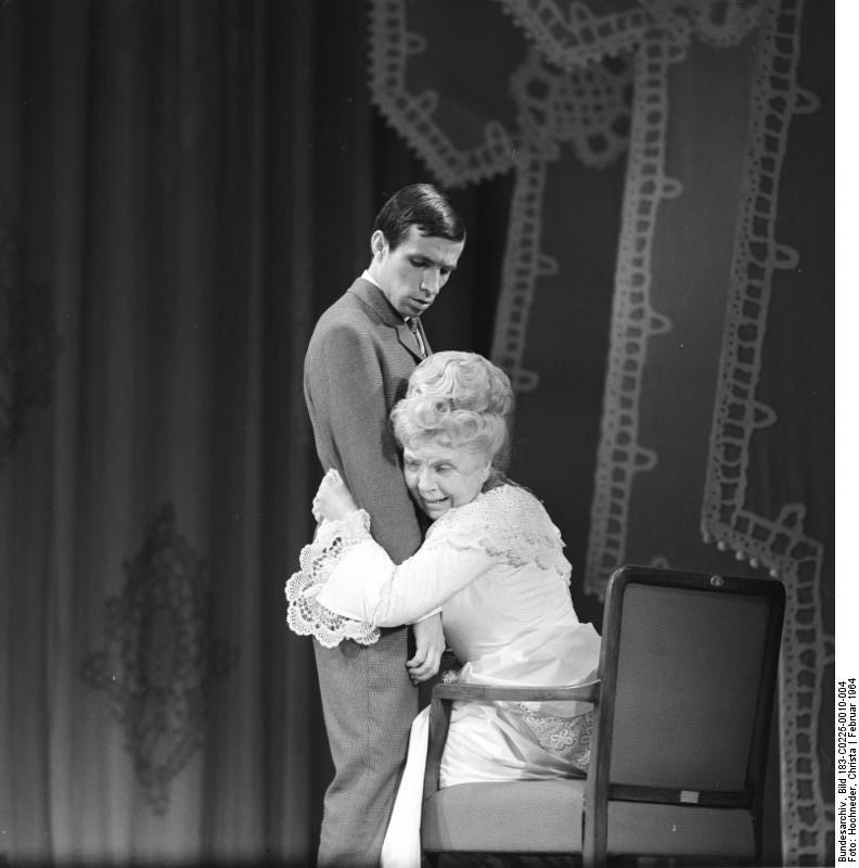 Maxim-Gorki-Theater, Szenenbild "Frau Jenny Treibel" Zentralbild/Hochneder 25.2.1964 "Frau Jenny Treibel"... oder "Wo sich Herz zum Herzen find´t" - eine Berliner Komödie von Claus Hammel nach Motiven von Theodor Fontane- wird am 28.2.1964 im Berliner Maxim-Gorki-Theater uraufgeführt. Die Regie führt Horst Schönemann. UBz: Eine Szene aus dem Stück mit Friedel Nowack als Jenny Treibel und Winfried Wagner als ihr Sohn Leopold. Abgebildete Personen: Wagner, Winfried: Schauspieler, DDR